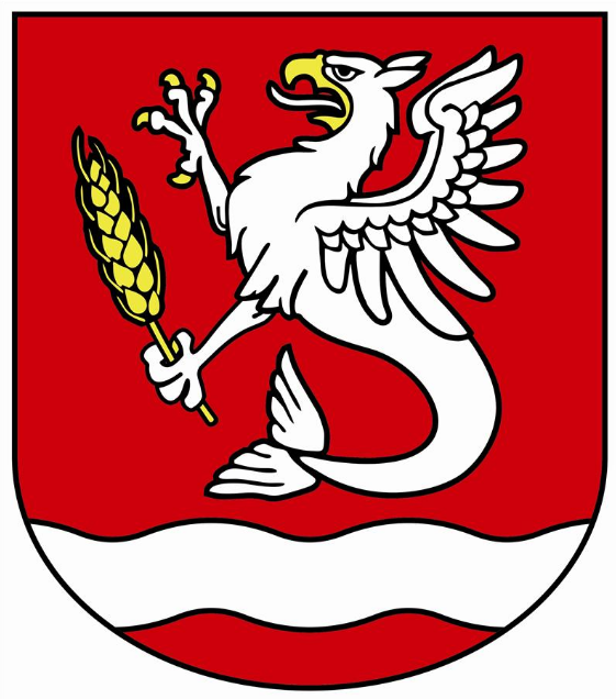 Herb gminy Sławno